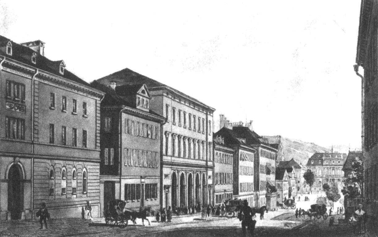 Schlossstraße (heutige Bolzstraße) in Stuttgart mit dem ersten Bahnhof (1846 erbaut von Karl Etzel). Ganz links im Bild das ehemalige Palais Conradi.